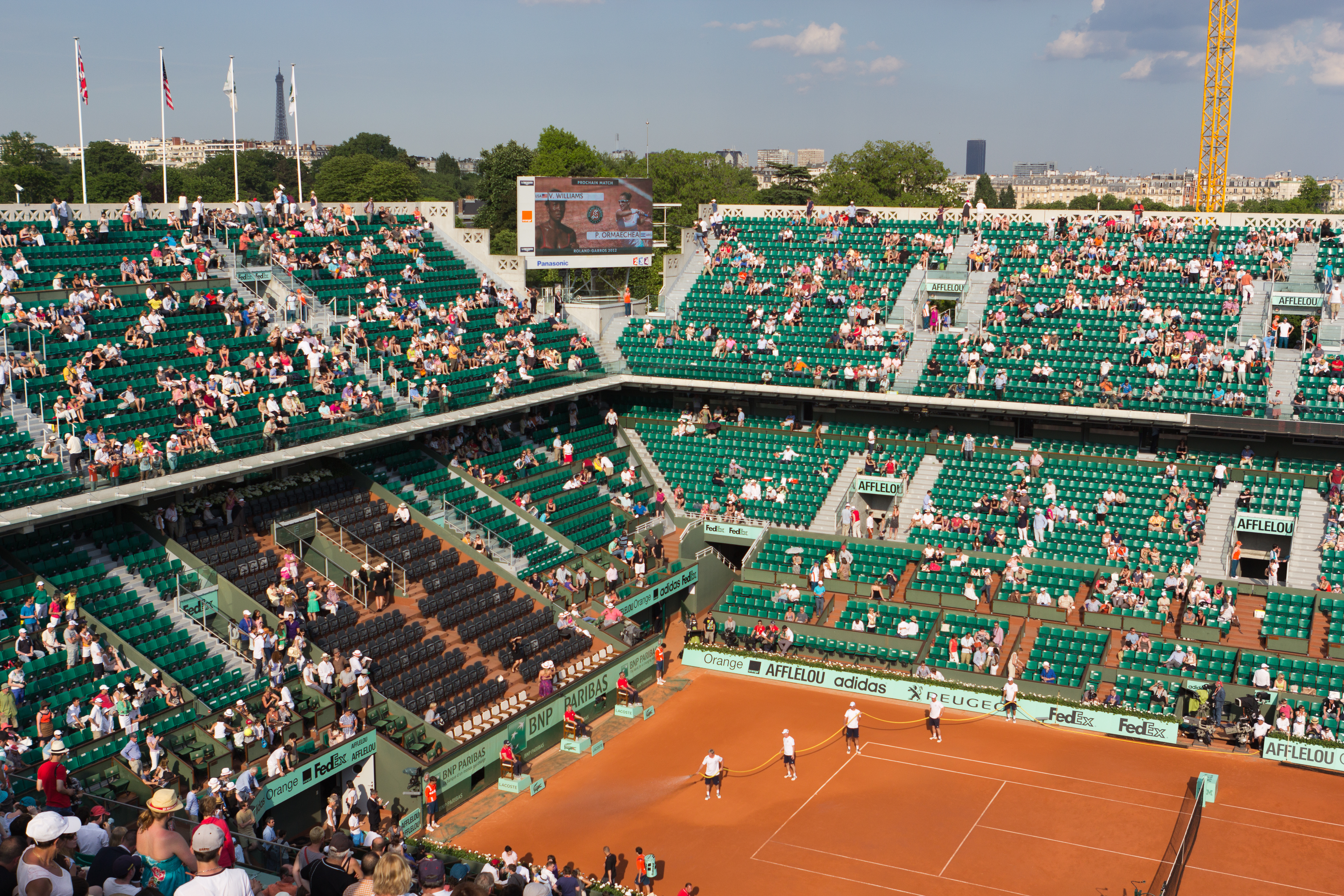 Vue de l'angle des tribunes J. Brugnon et H. Cochet - Court Philippe Chatrier - Stade de Roland Garros - 27 mai 2012, Paris, France